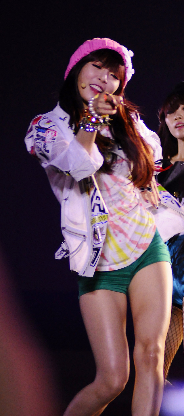 Hyuna at K-pop festival in Vietnam